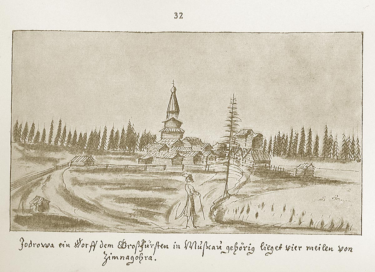 Едрово